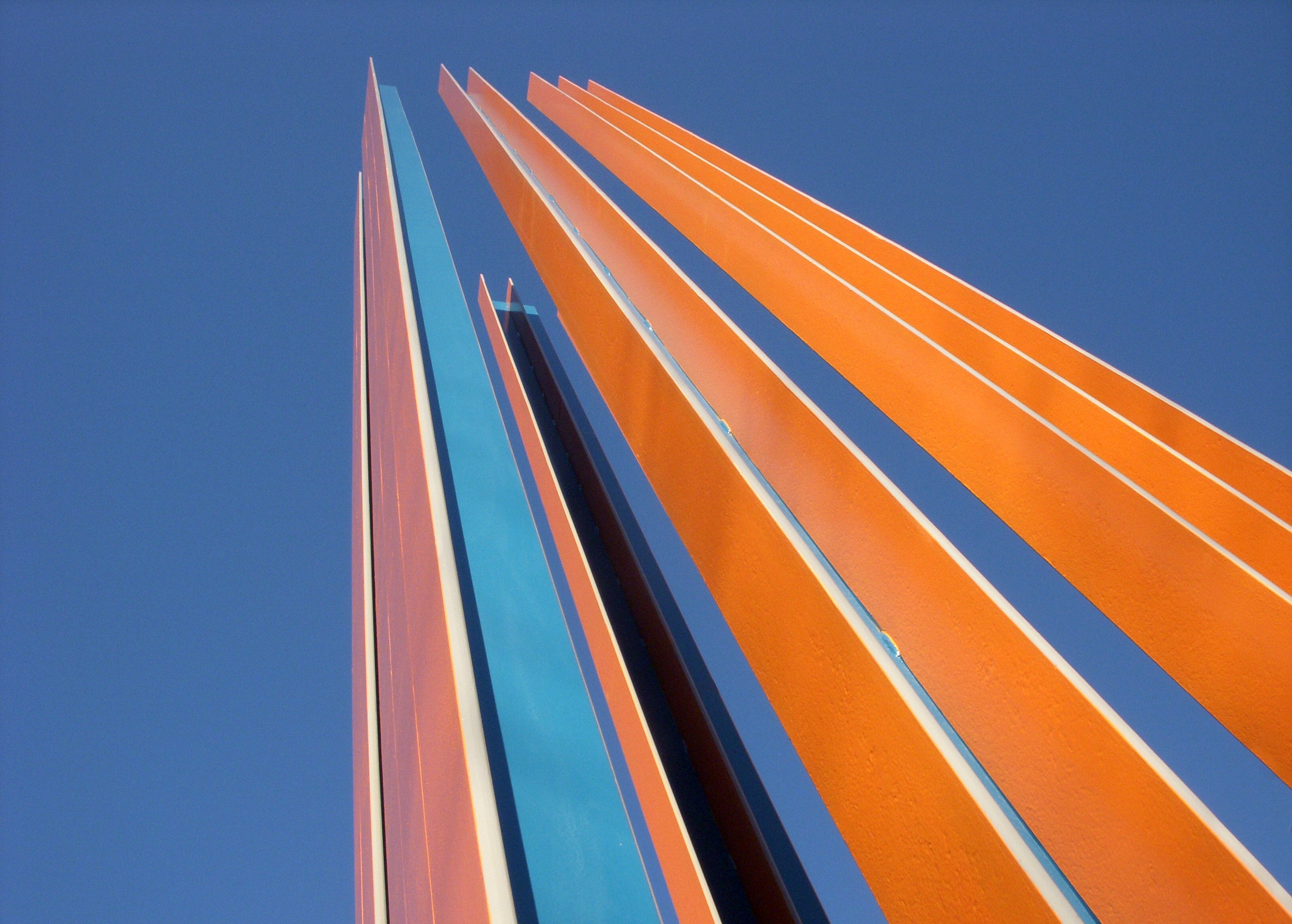 Skulptur "Färgtorn" på Kungsholmen skapad av Lars Erik Falk